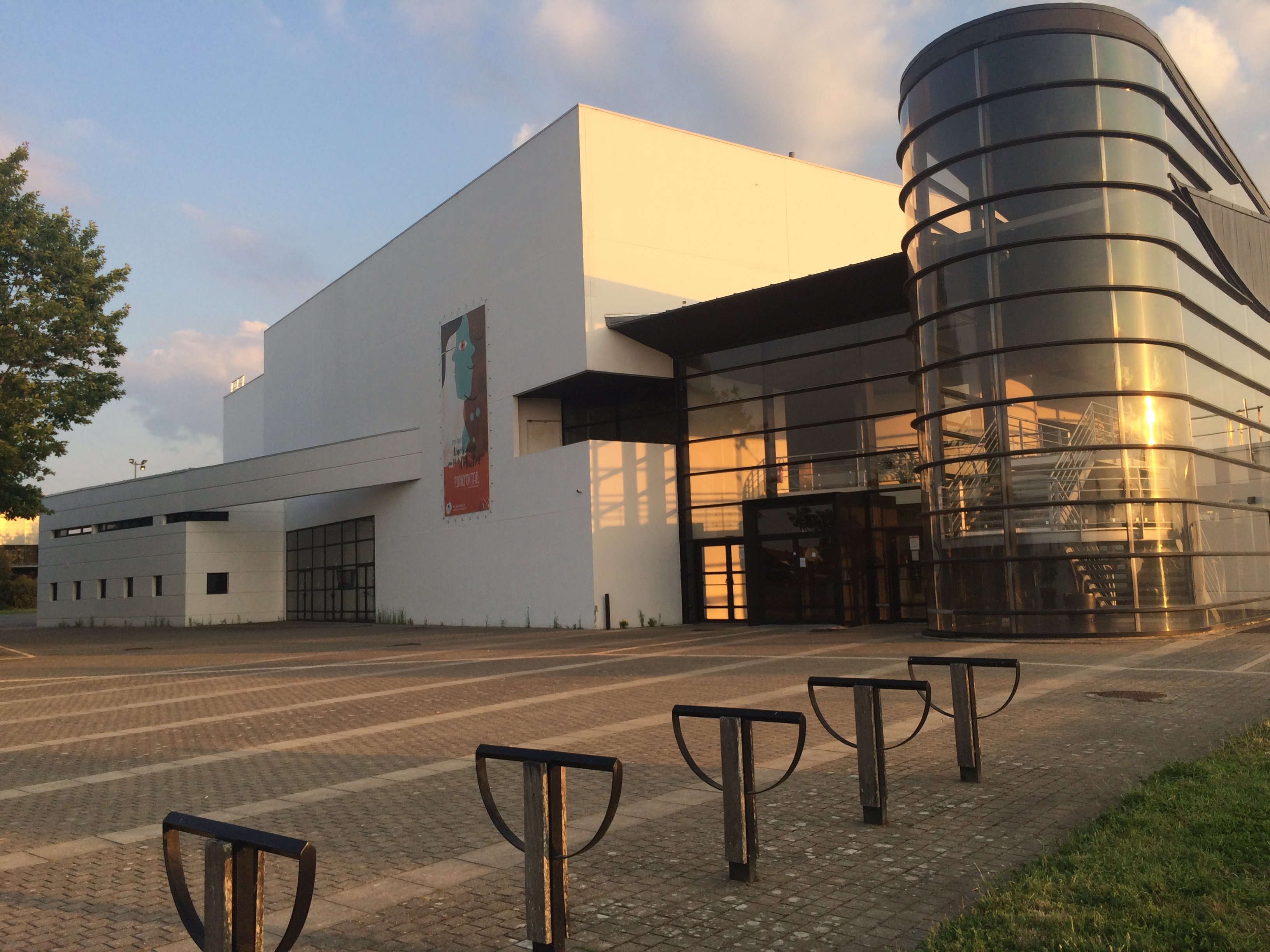 Vue du devant du Piano'cktail